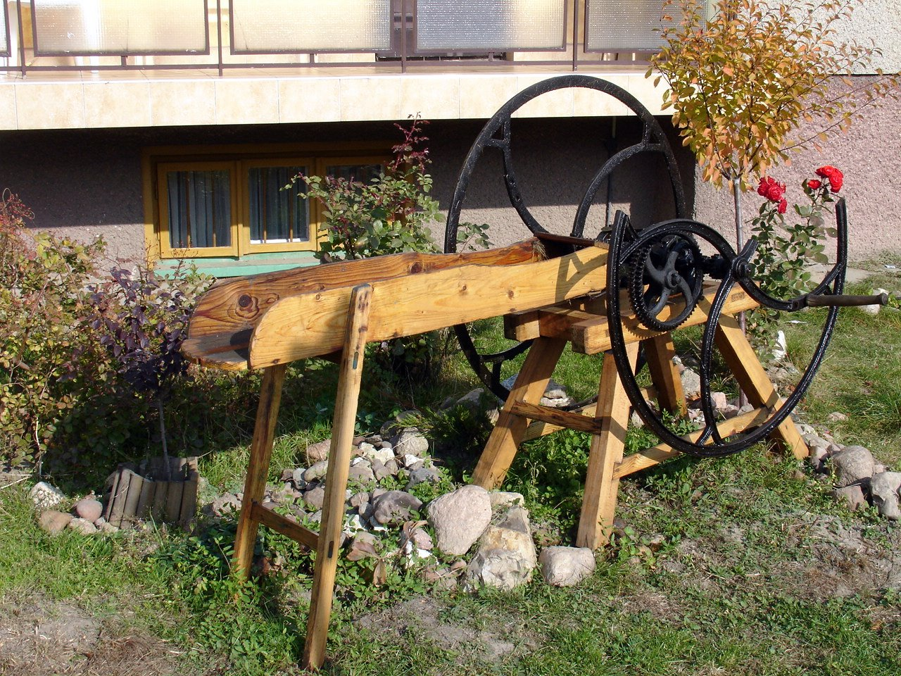 Sieczkarnia napędzana korbą. Na czarno pomalowany jest mechanizm napędowy i tryby. Podstawa oraz rękaw do podawania słomy zbudowane są z drewna.